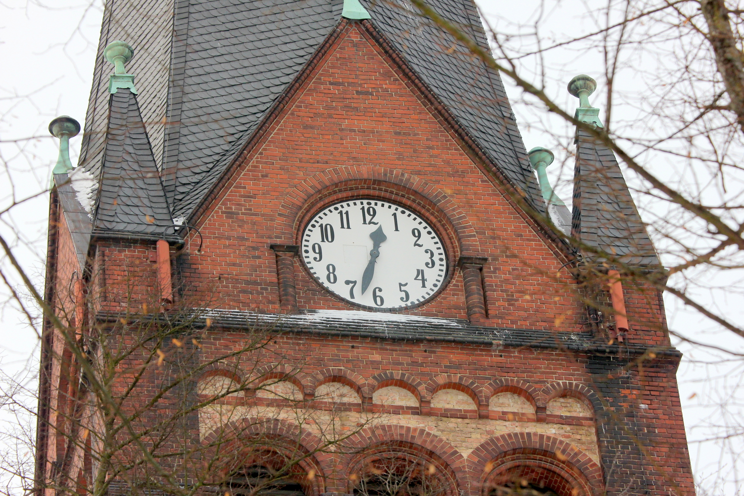 Luckenwalde in Brandenburg: Die Jakobikirche, Turm mit Turmuhr. Das Gebäude ist ein eingetragenes Baudenkmal.